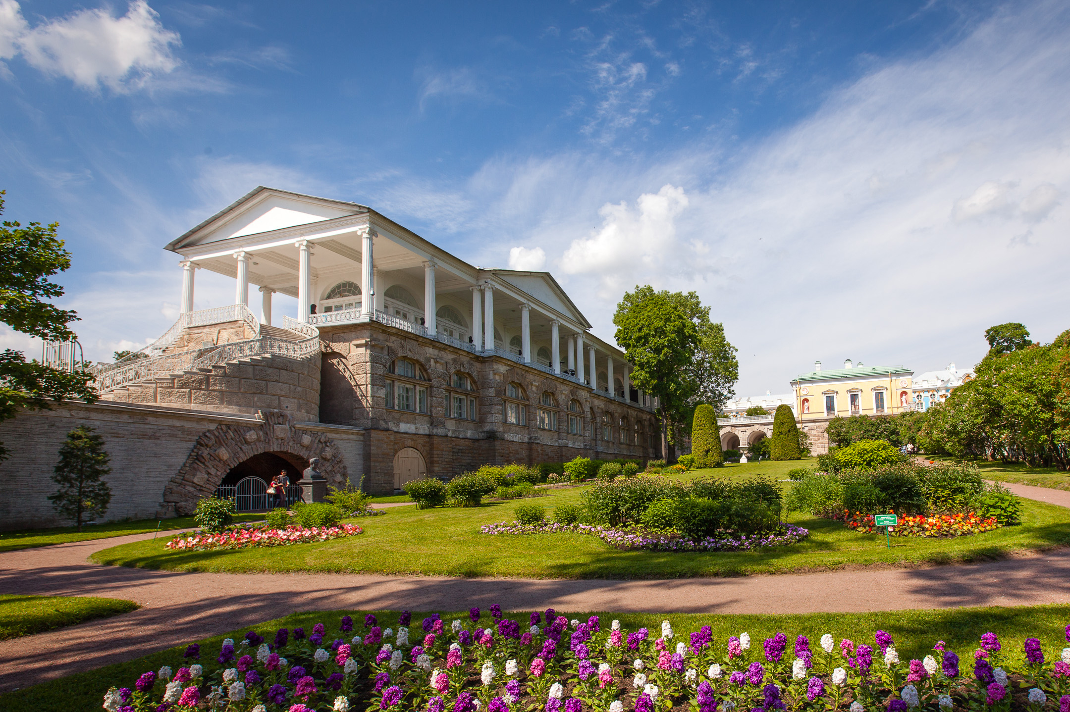 St. Petersburg